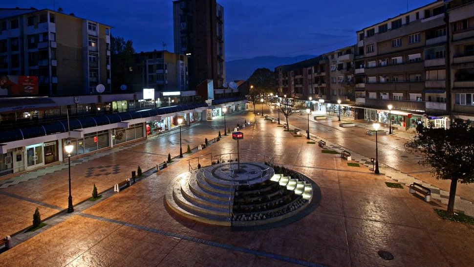 Српски (ћирилица): Трг пиротских ослободилаца